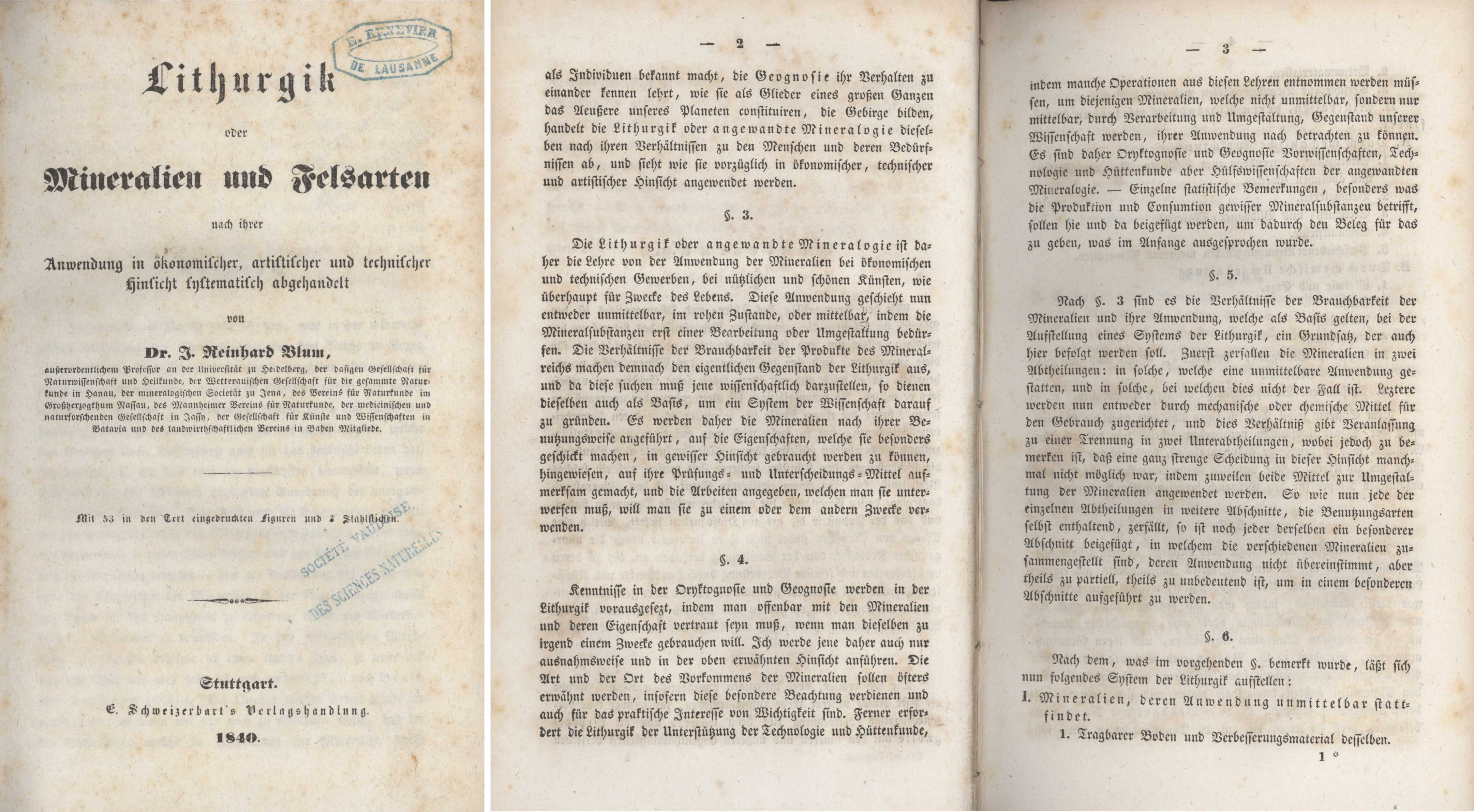 J. Reinhard Blum:Lithurgik oder Mineralien und Felsarten nach ihrer Anwendung in ökonomischer, artistischer und technischer Hinsicht systematisch abgehandelt. Stuttgart (Schweizerbart's Verlagshandlung) 1840